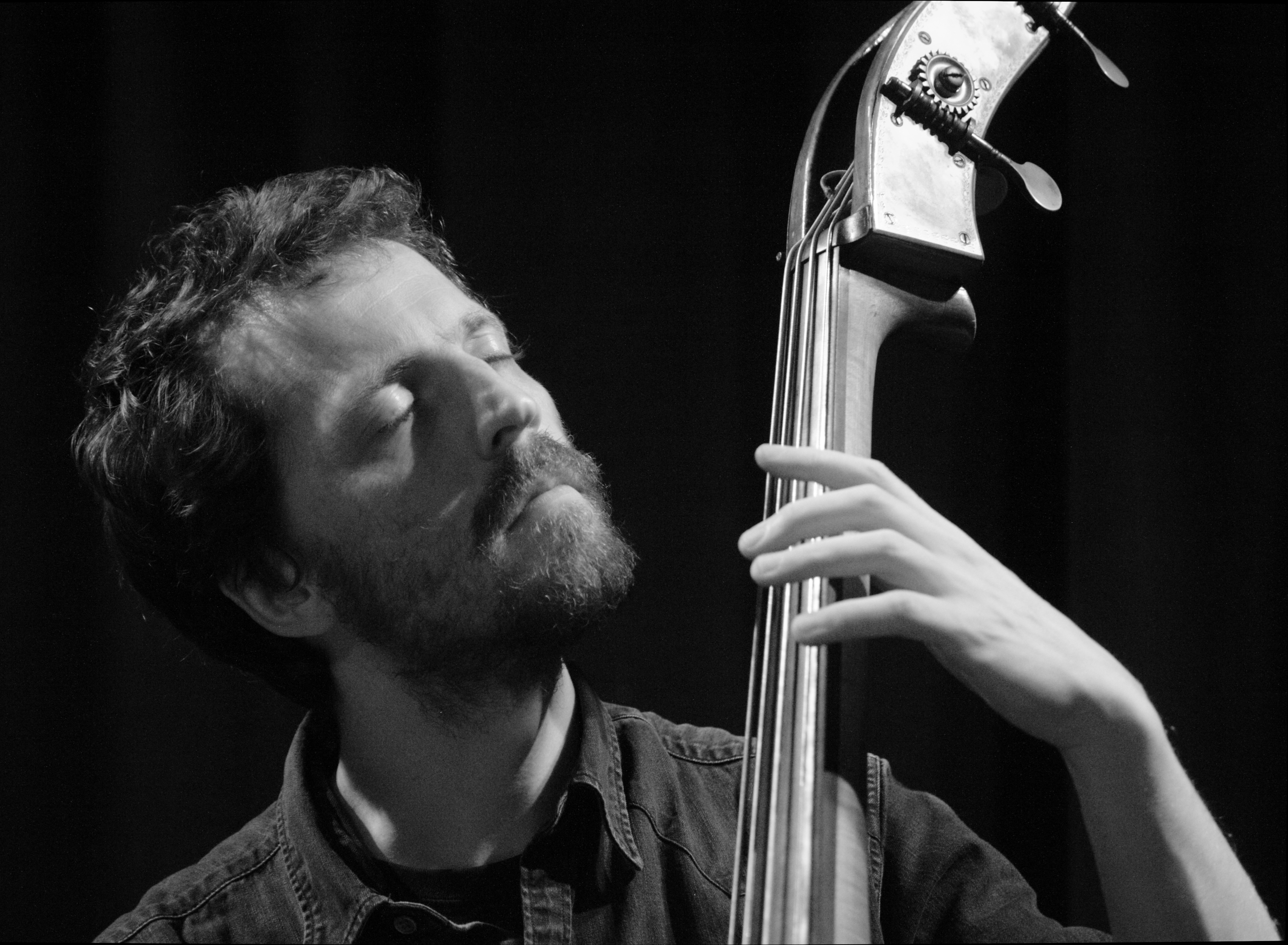 Phil Donkin mit dem Trio Uncanny Valley in der Bessunger Knabenschule in Darmstadt am 13. April 2019